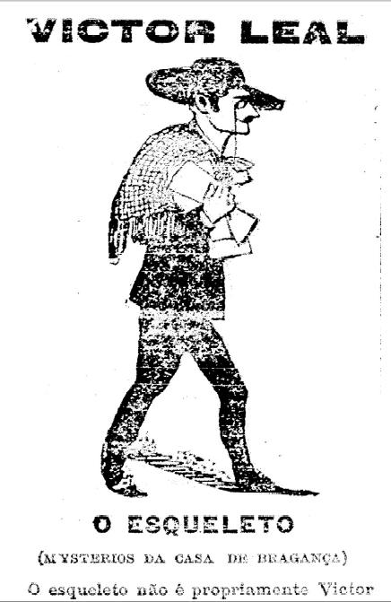 Caricatura do autor fictício Victor Leal, desenhada por Gustavo Hastoy